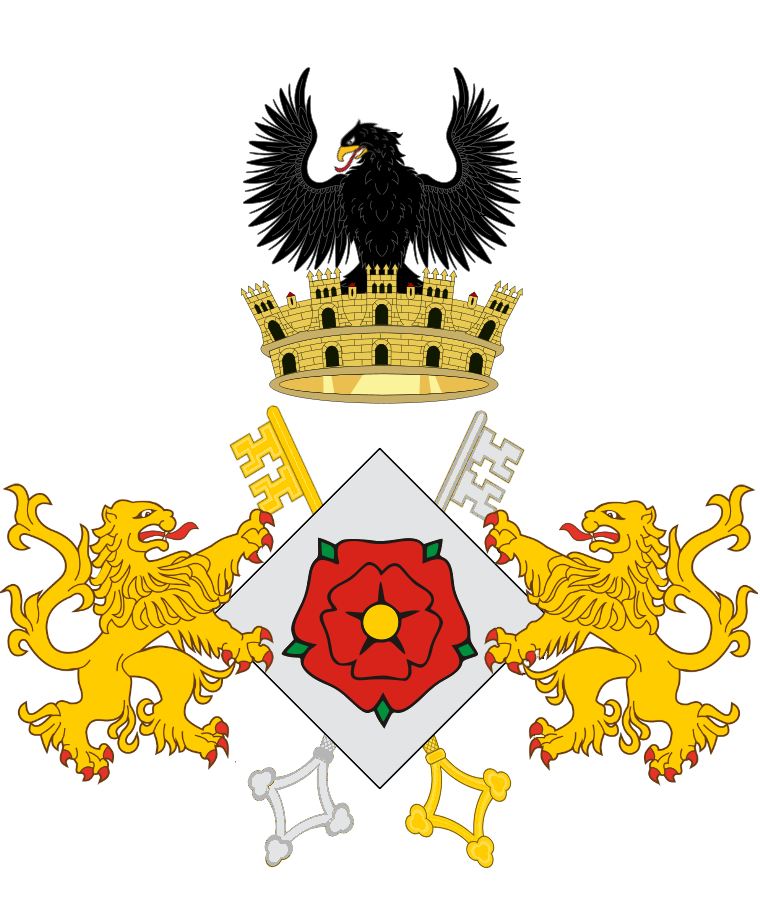 Escut de Reus proposat per Armand de Fluvià a la Gran Geografia Comarcal de Catalunya (1981/1984)